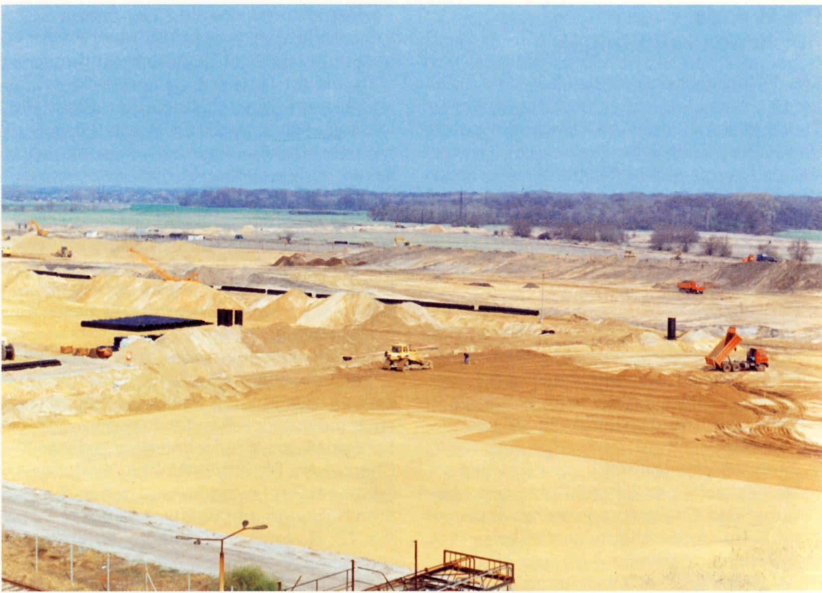 Die Flächen von zurückgebauten Anlagen werden saniert, um Platz für Neuansiedlungen zu schaffen